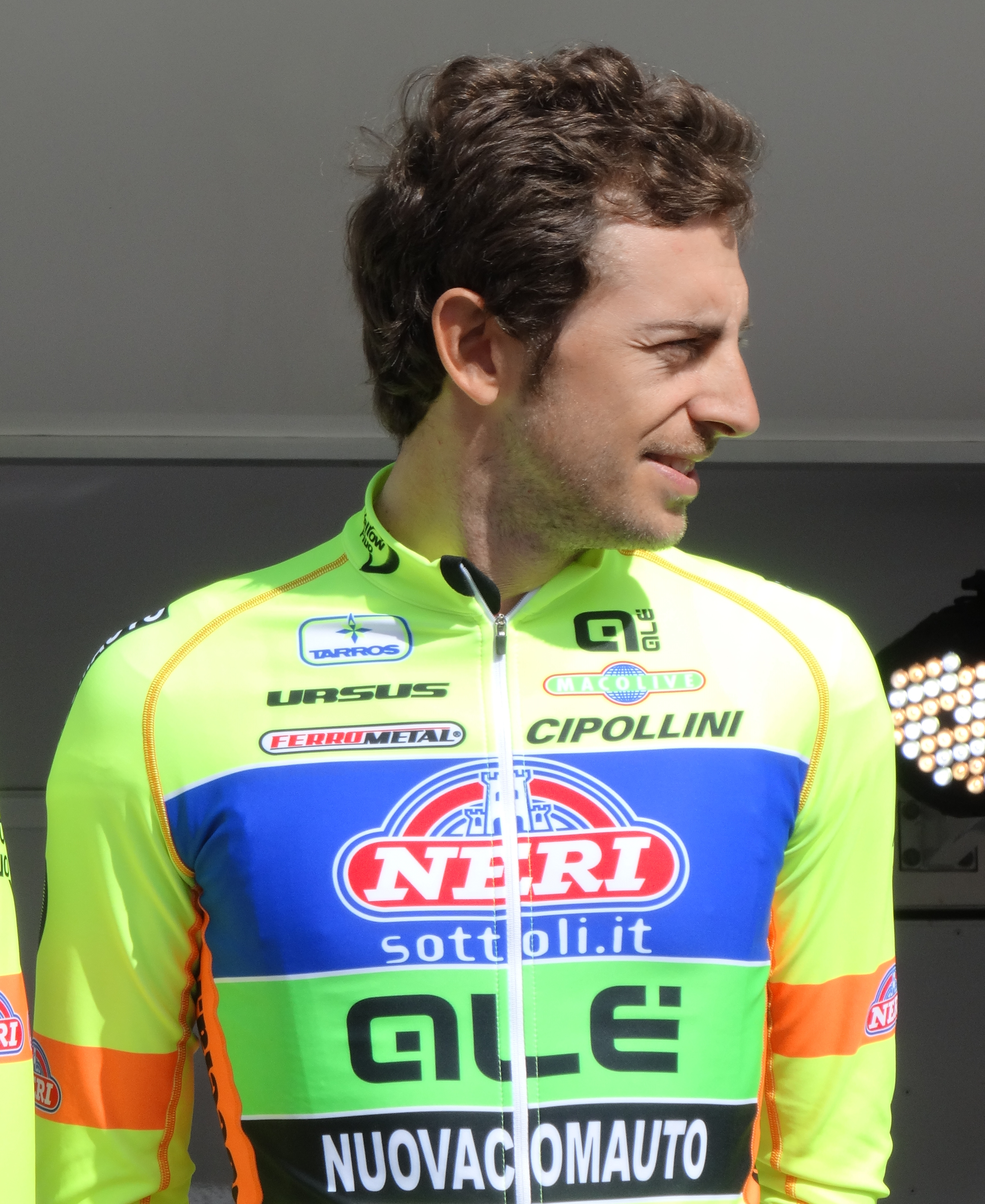 Reportage réalisé le jeudi 17 avril à l'occasion du départ et de l'arrivée du Grand Prix de Denain 2014 à Denain, Nord, Nord-Pas-de-Calais, France.